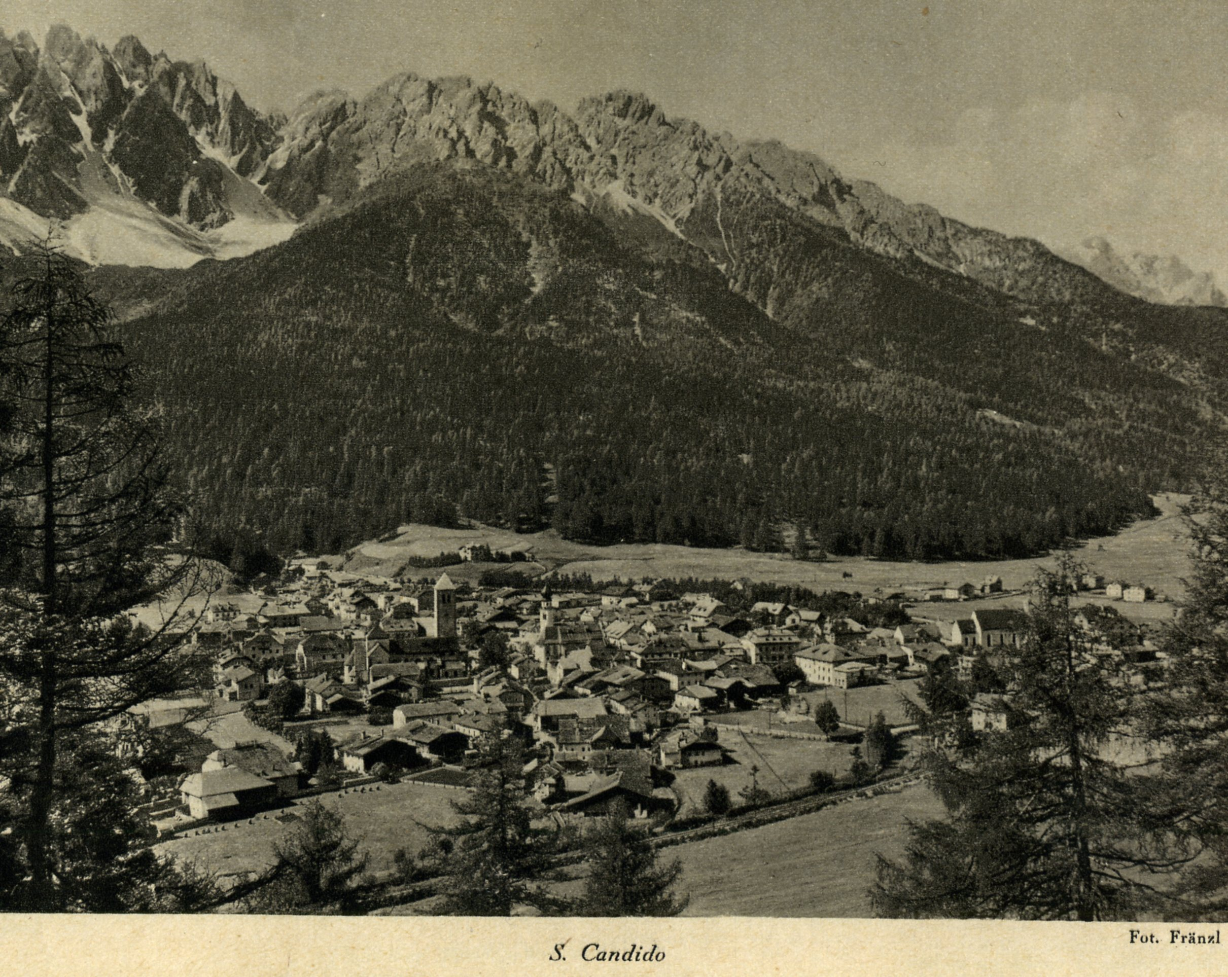 San Candido, guida pratica del TCI, 1935